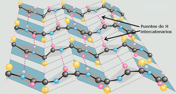 Estructura secundaria de las proteínas. Hoja Beta.